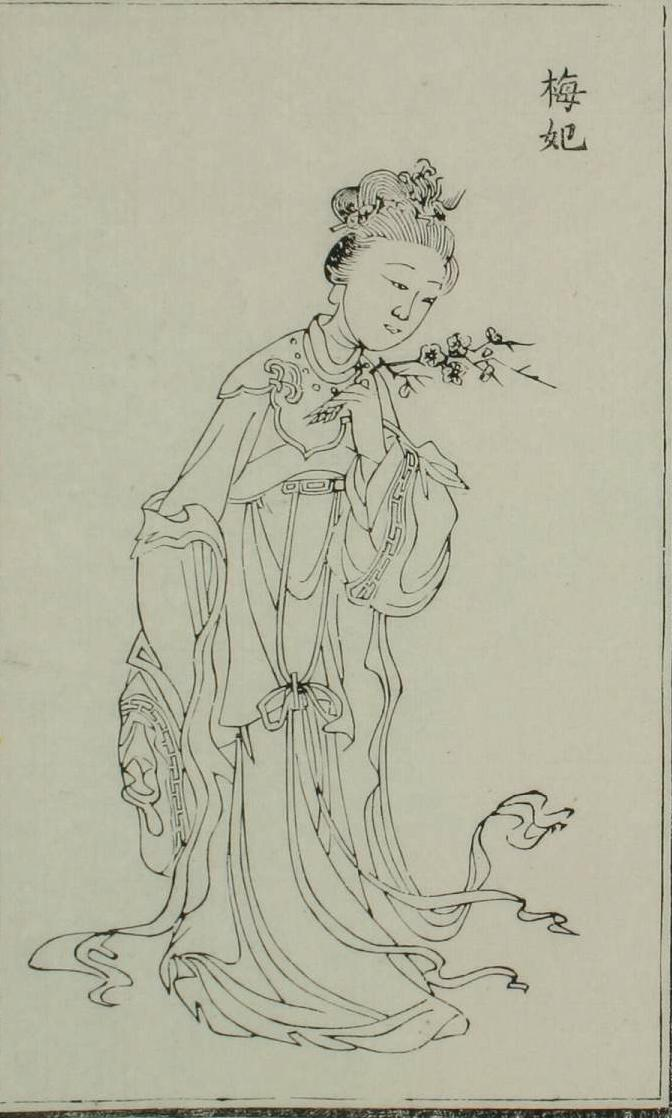 关于江采蘋的图像。